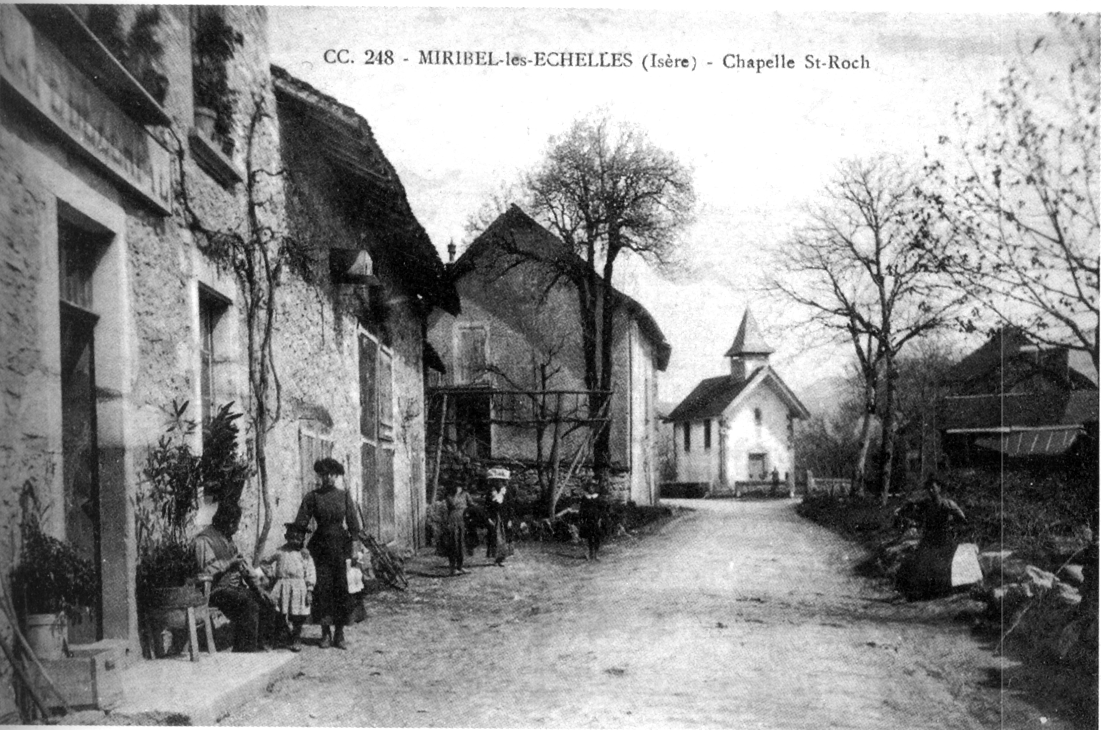 Miribel-les-Échelles, Chapelle Saint-Roch en 1908, p 125 de L'Isère les 533 communes.jpg Sur la gauche, "Café Dezempte"